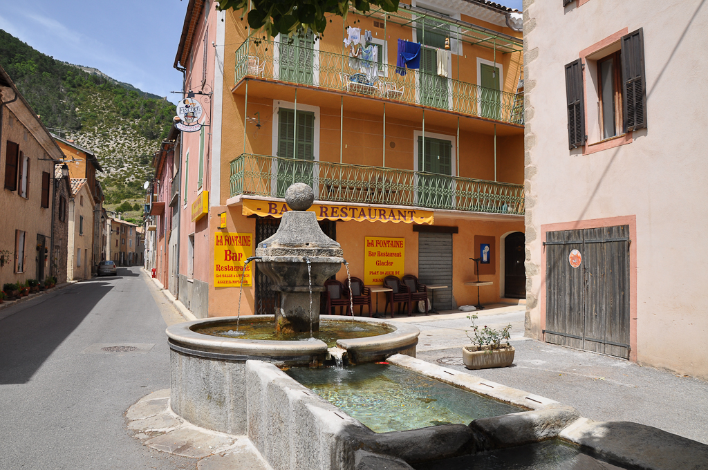 Le Fugeret, fontaine